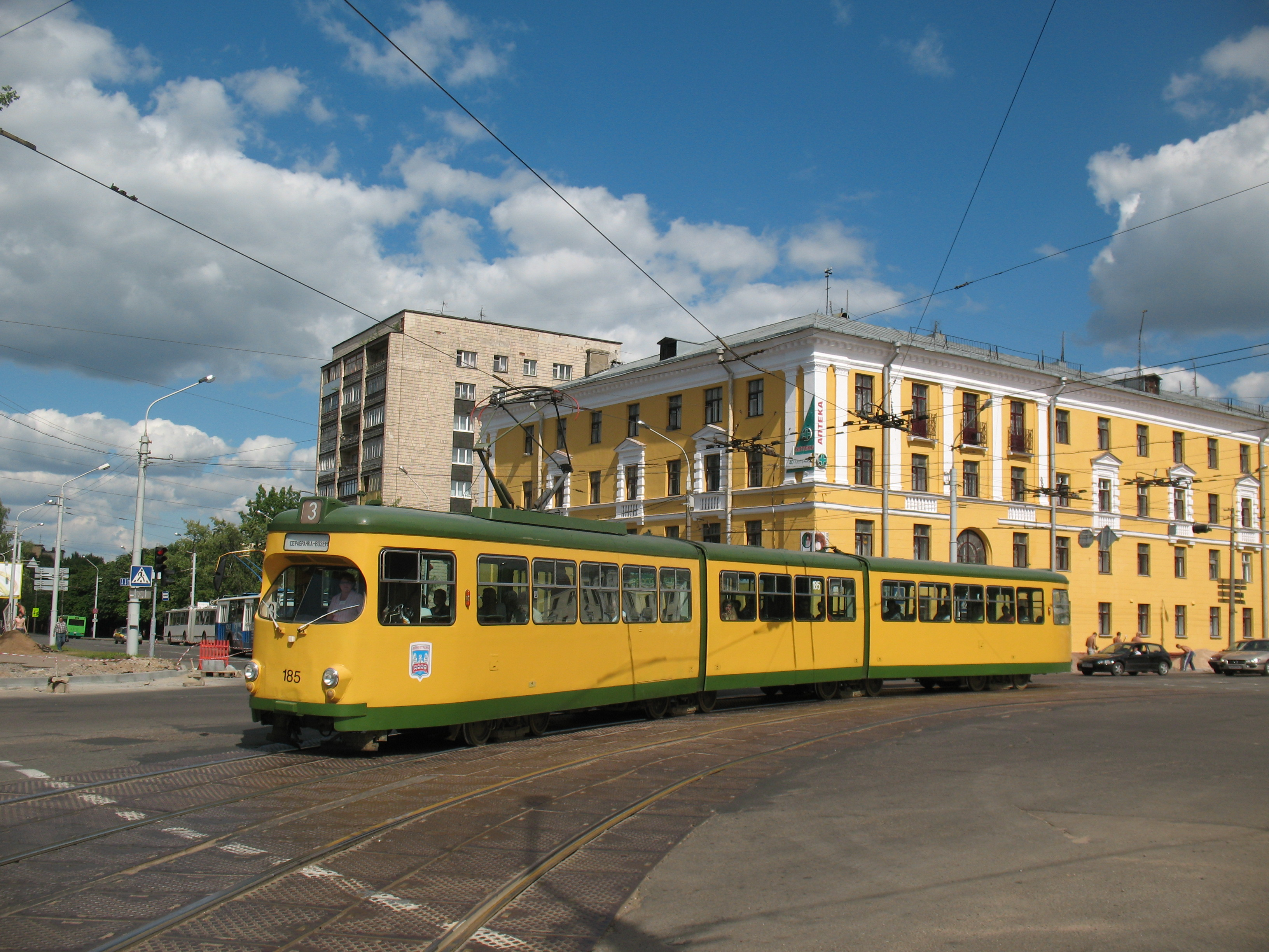 Build in 1969 Operation in Minsk: 2003-2009 Минский трамвай в 2007 году